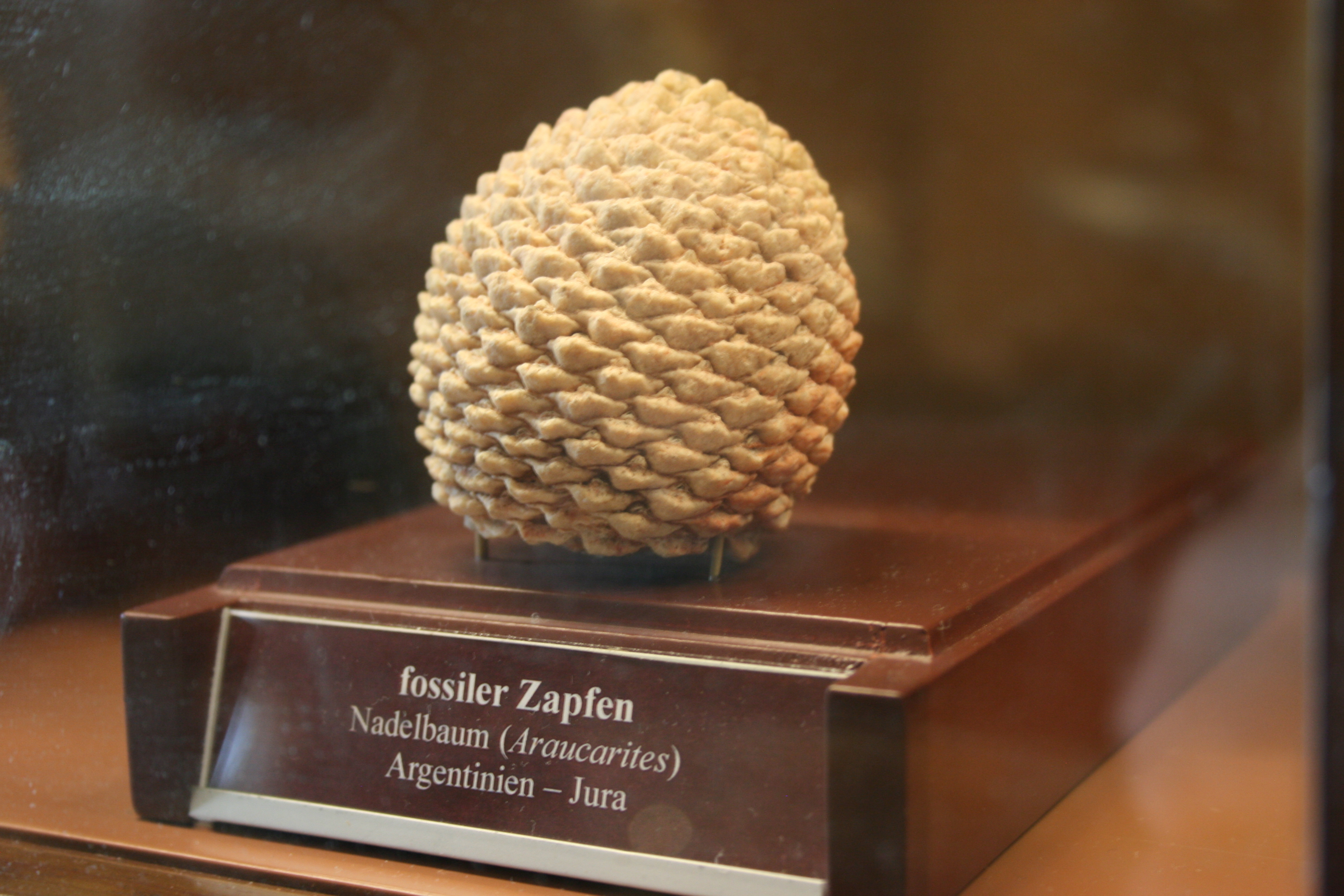 Fossiler Zapfen